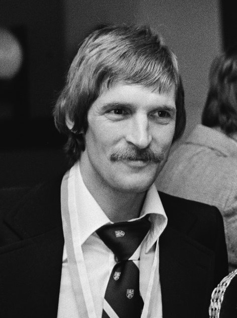 Frans Thijssen.